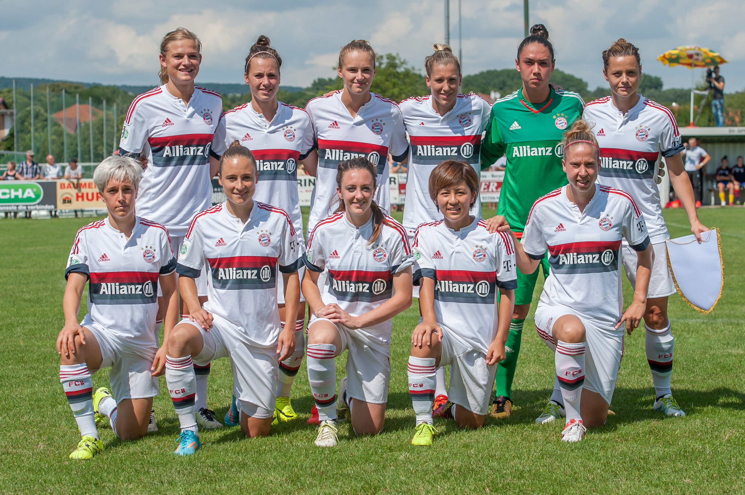 Testspiel SKN St. Pölten vs FC Bayern München am 23. Juli 2016 in Spillern. Bild zeigt FC Bayern Muenchen v.l. stehend: Carina Wenninger, Viktoria Schnaderbeck, Vivianne Miedema, Verena Faisst, Manuela Zinsberger und Nora Holstad v.l. kniend: Claire Falknor, Gina Lewandowski, Lisa Evans, Mana Iwabuchi und Caroline Abbe